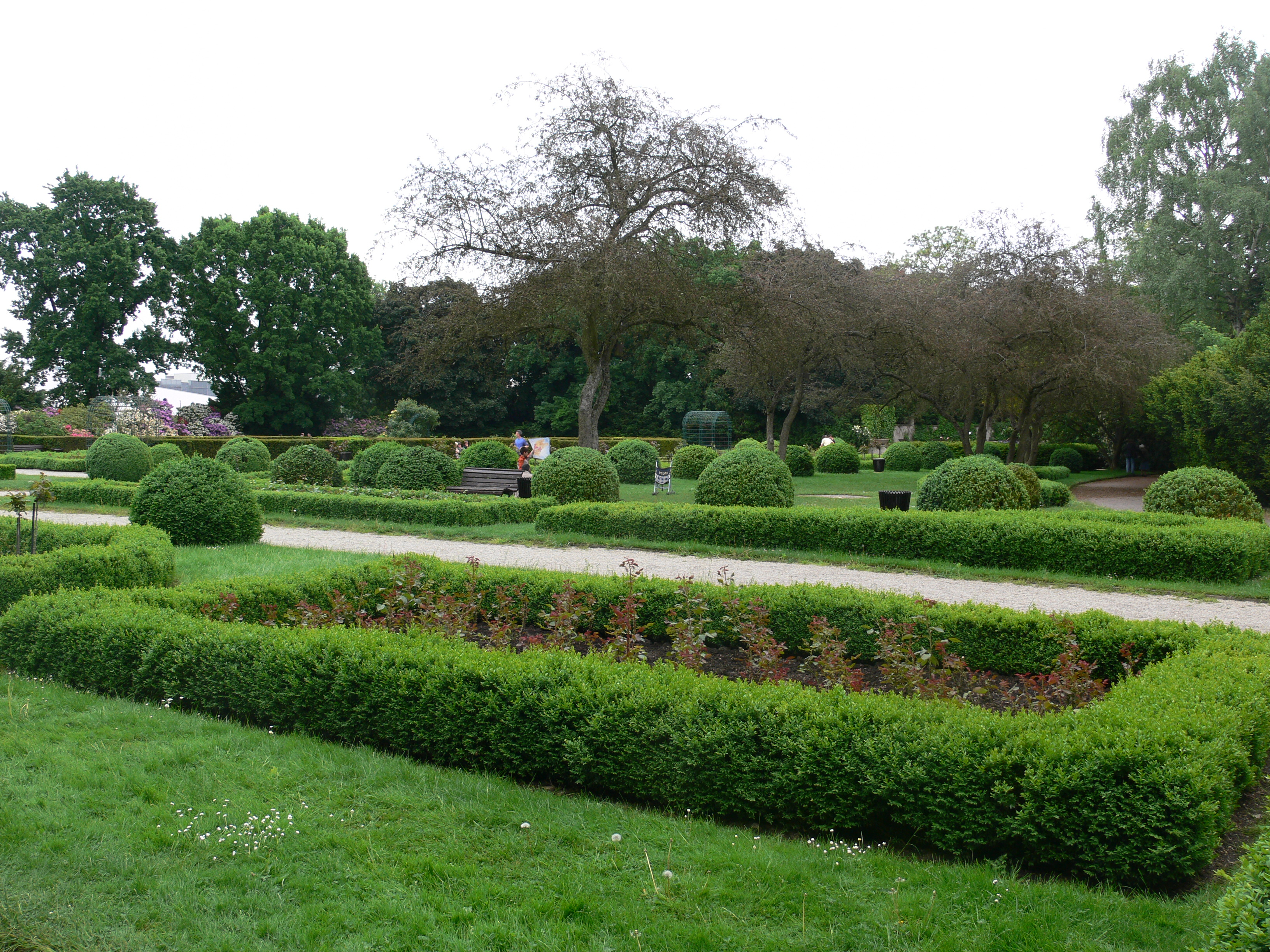 Volkspark Humboldthain (Berlin-Gesundbrunnen) Rosengarten